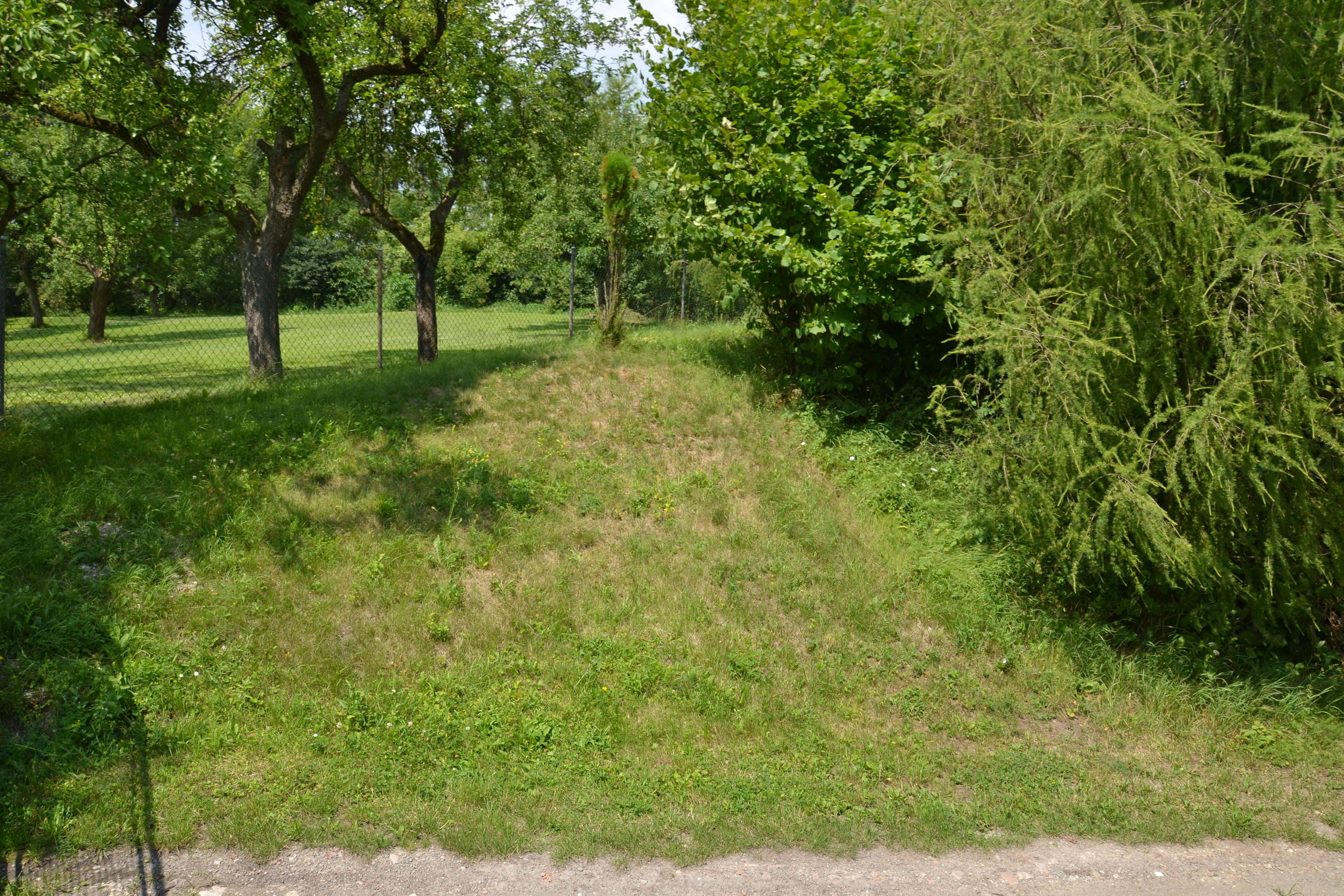 Veselice – val na východním okraji hradu